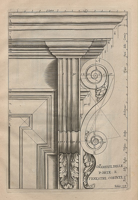 Original image description from the Deutsche Fotothek Architektur & Volute & Akanthus